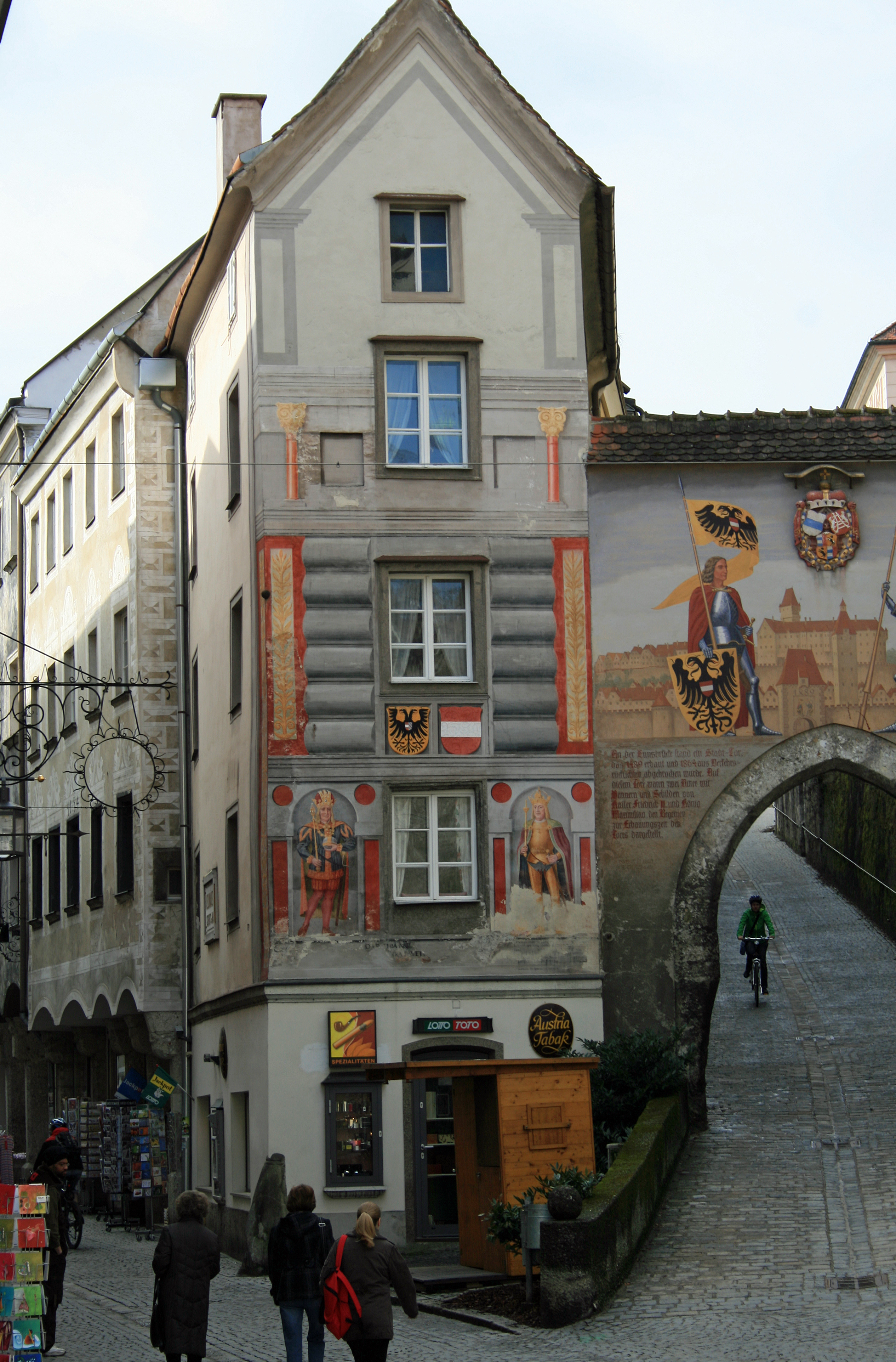 Geburtshaus Aloys Blumauers in Steyr, Berggasse 1